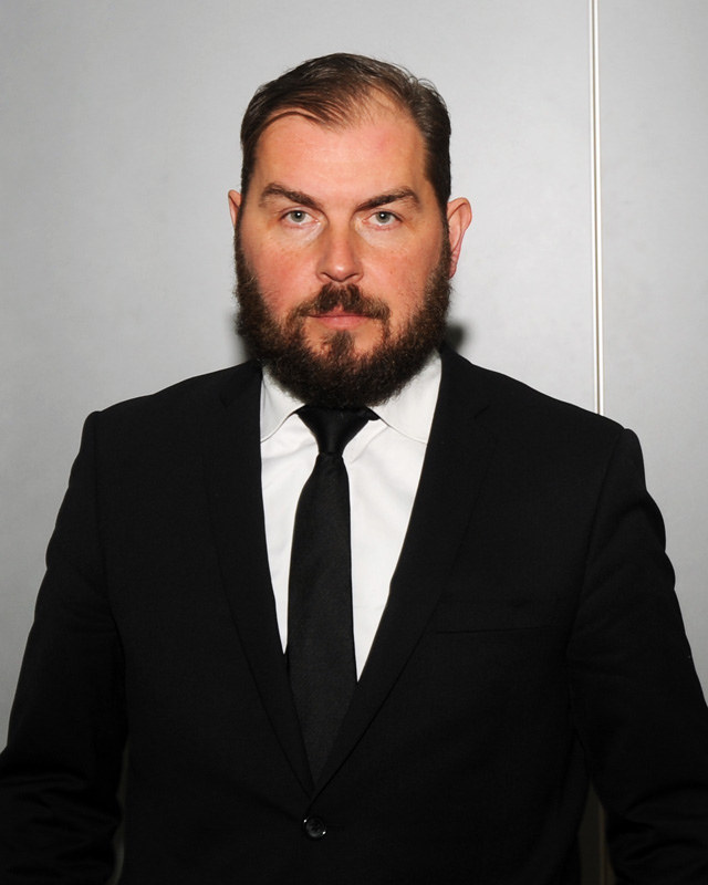 a_50_9065